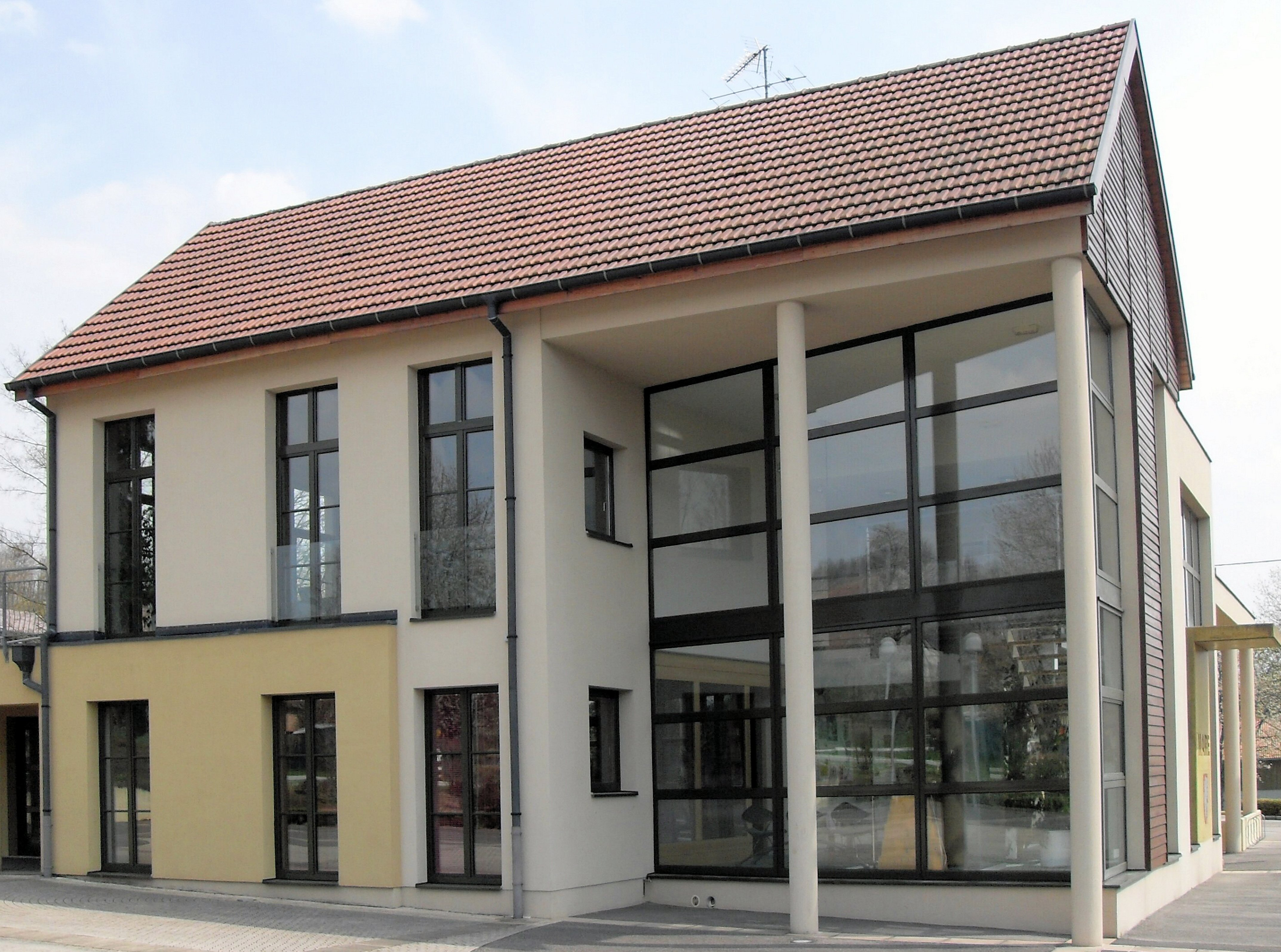 La mairie de Jettingen